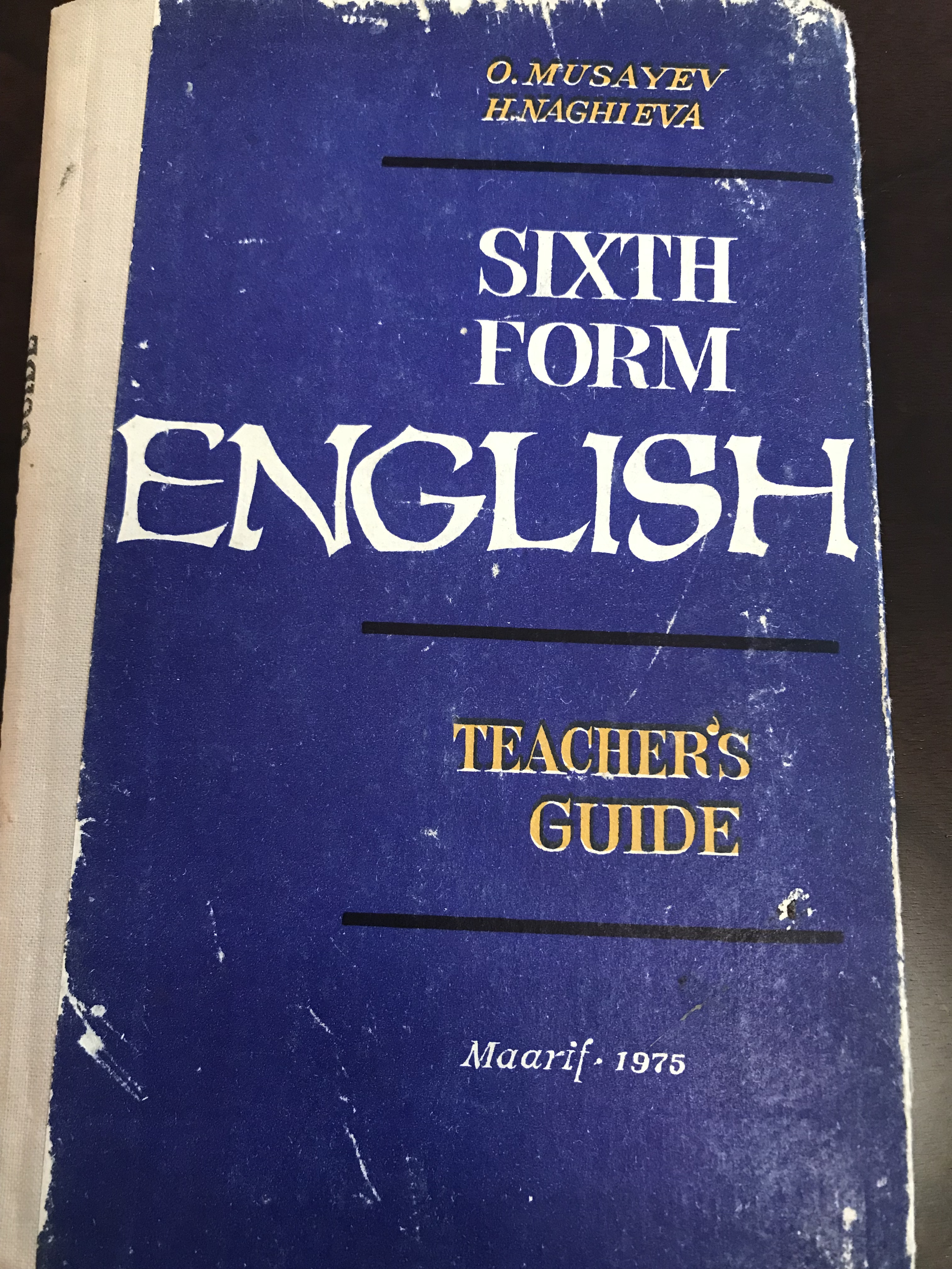 6-cı siniflər üçün İngilis dili dərsliyi. Bakı - 1975